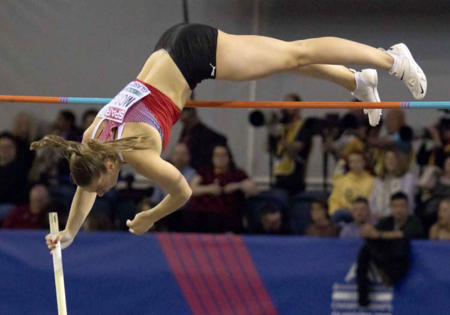 EKI30279 finale polsstok moser